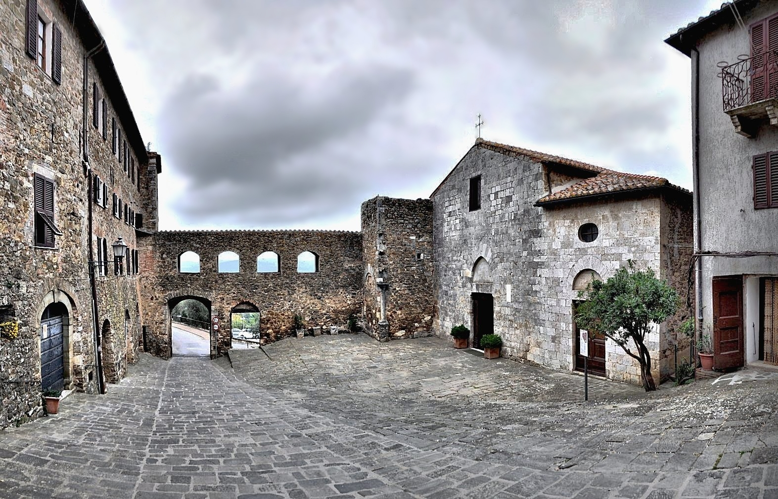 Piazza della Chiesa di San Giorgio, conosciuta anche come della Madonna della Gattaiola This is a photo of a monument which is part of cultural heritage of Italy.